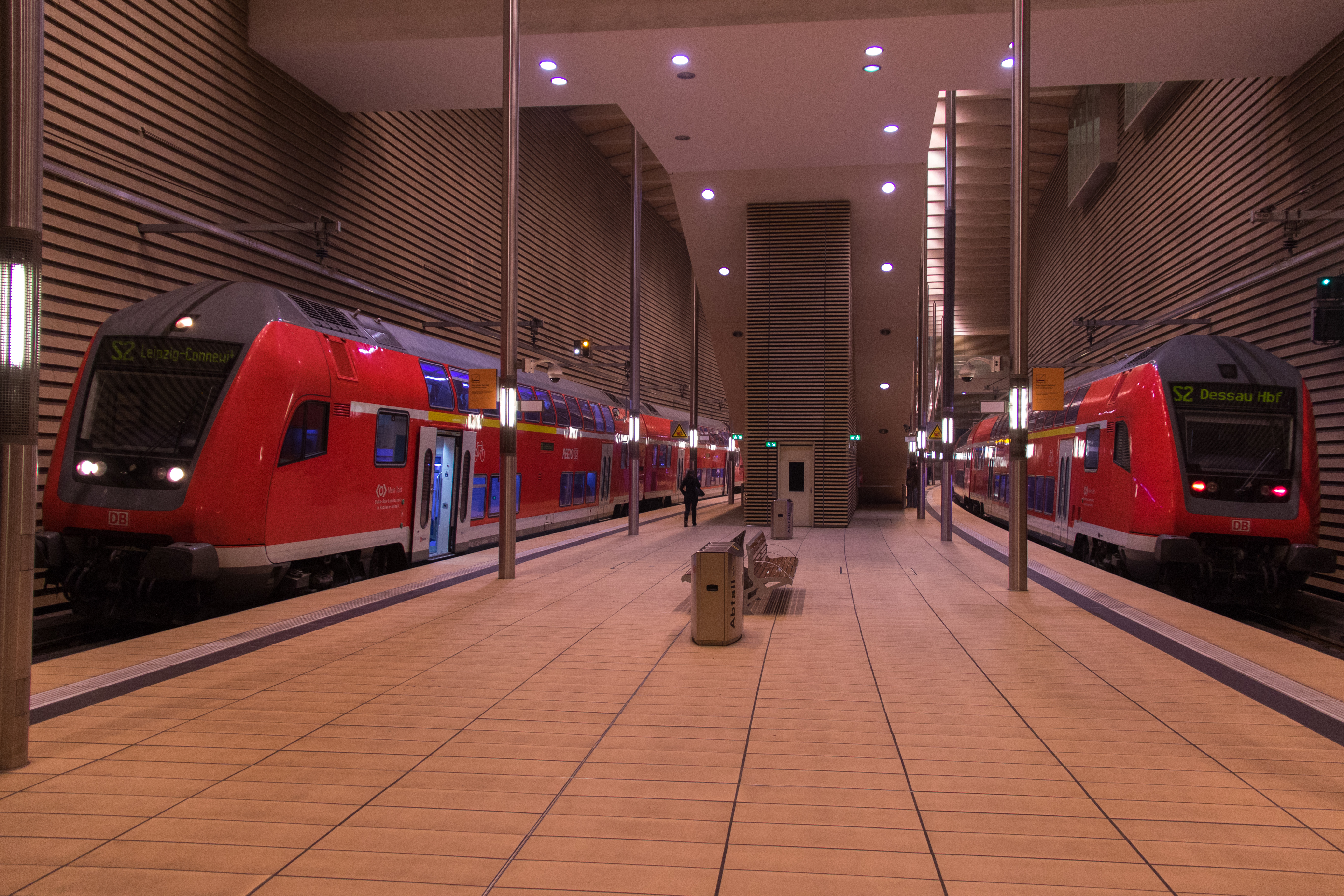 S2 mit Lokbespannter (BR 182) Zugeinheit mit 3 modernen Doppelstockwagen am Hp Leipzig Markt